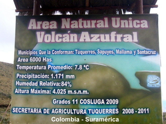 Volcán Azufral. Datos del lugar en Túquerres, Nariño, Colombia